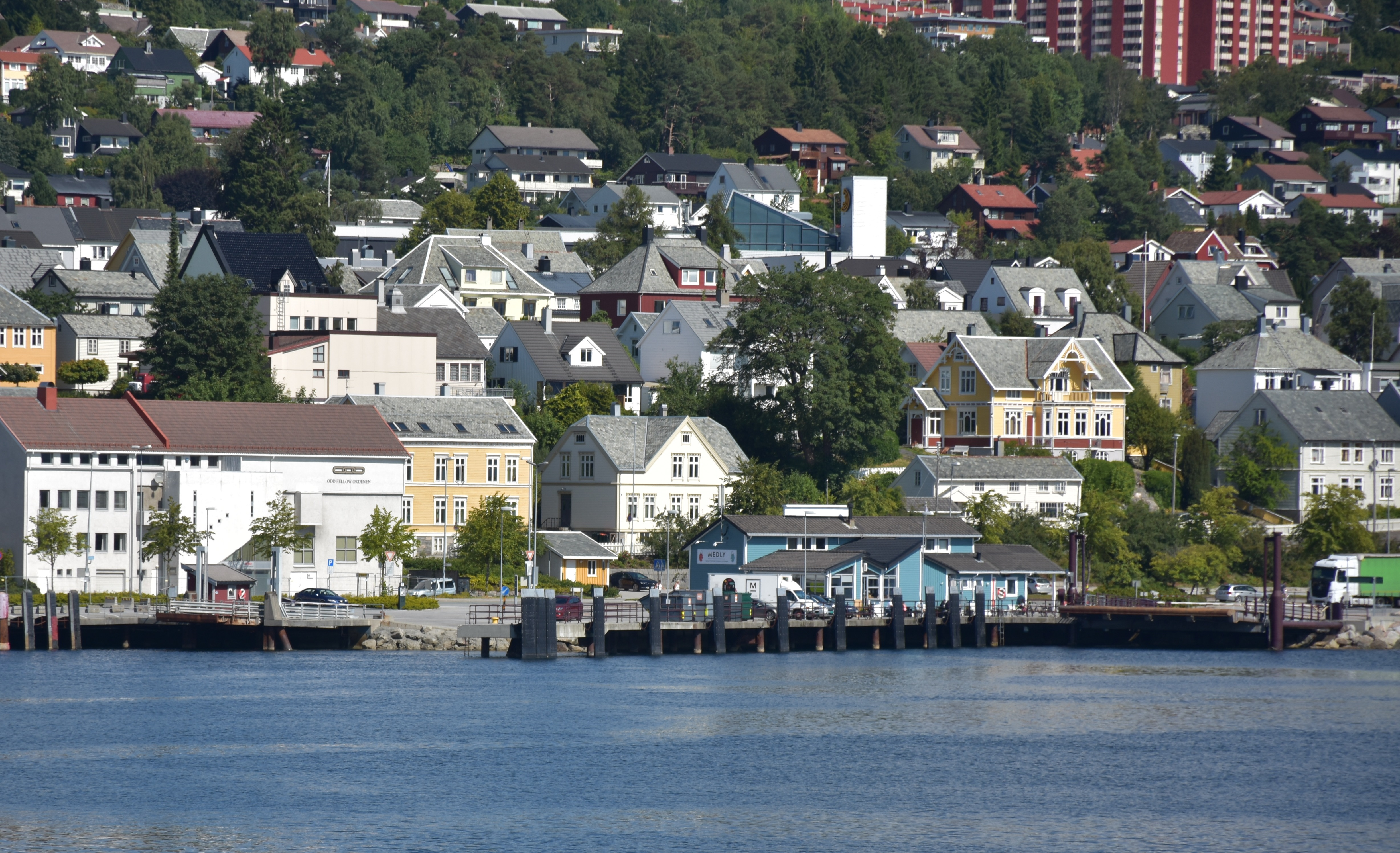 Molde fergekai